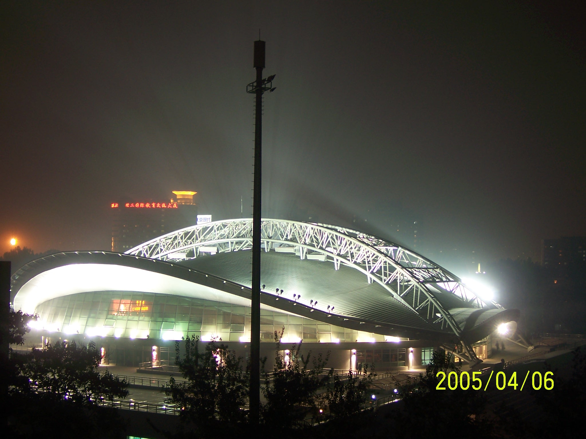 北京理工大学体育馆，2008北京奥运场馆之一。实际拍摄时间为2006年10月